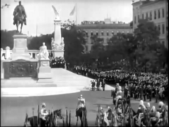 una scena del film